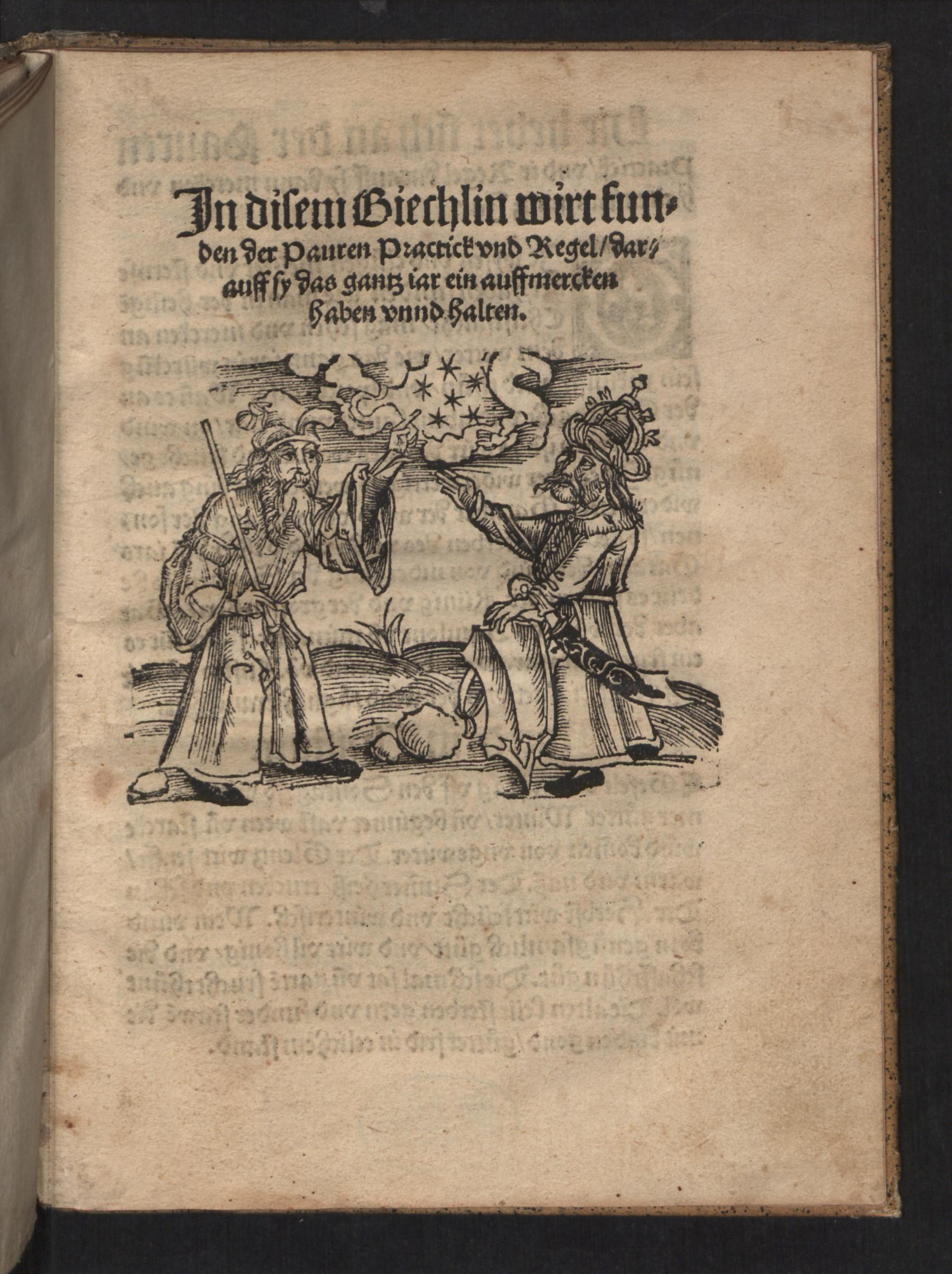 In disem Biechlin wirt funden der Pauren Practick vnd Regel/ darauff sy das gantz iar ein auffmercken haben vnnd halten (Bauernregeln 1515 aus dem historischen Bestand der Universitätsbibliothek Mannheim)